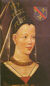 Edle Dame aus dem XIII Jh.